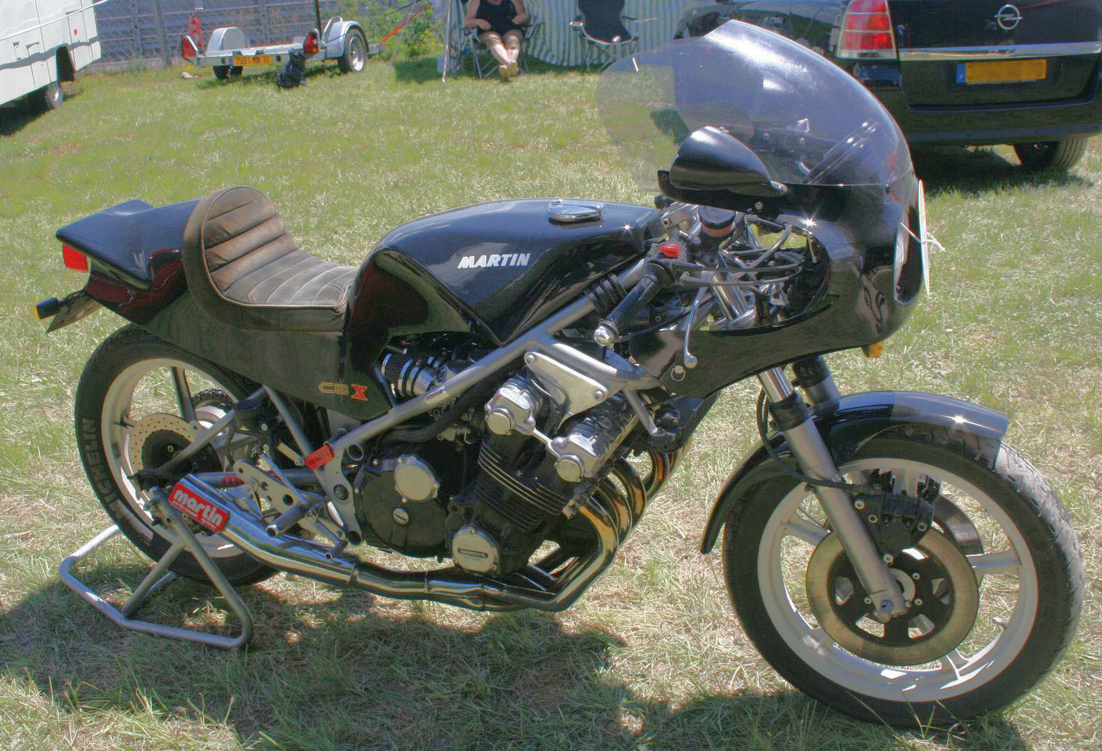 martin